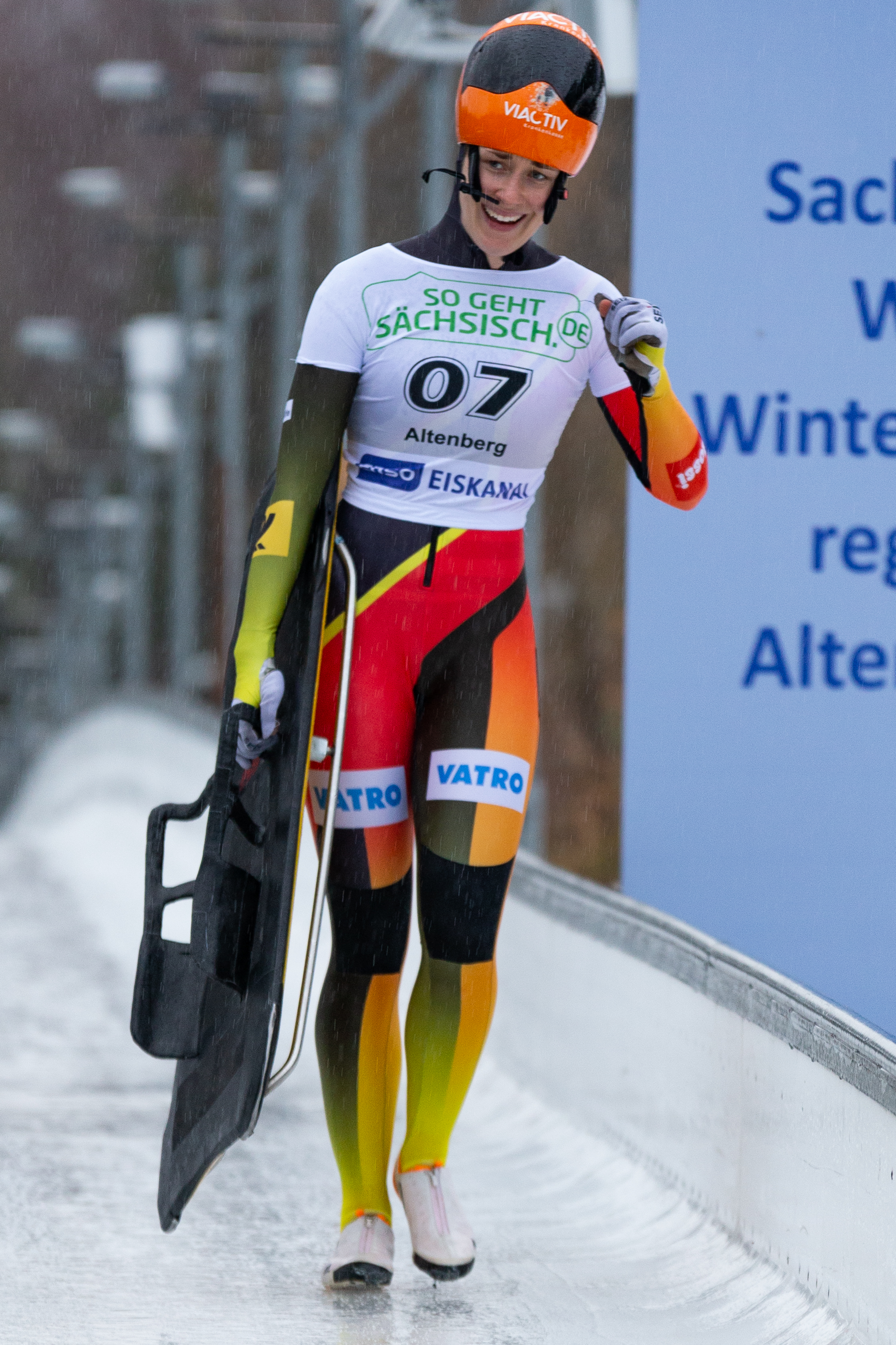 Deutsche Meisterschaften Skeleton; Jacqueline Lölling (RSG Hochsauerland) im Ziel; Zweitplatzierter, Silbermedaille, silver medal